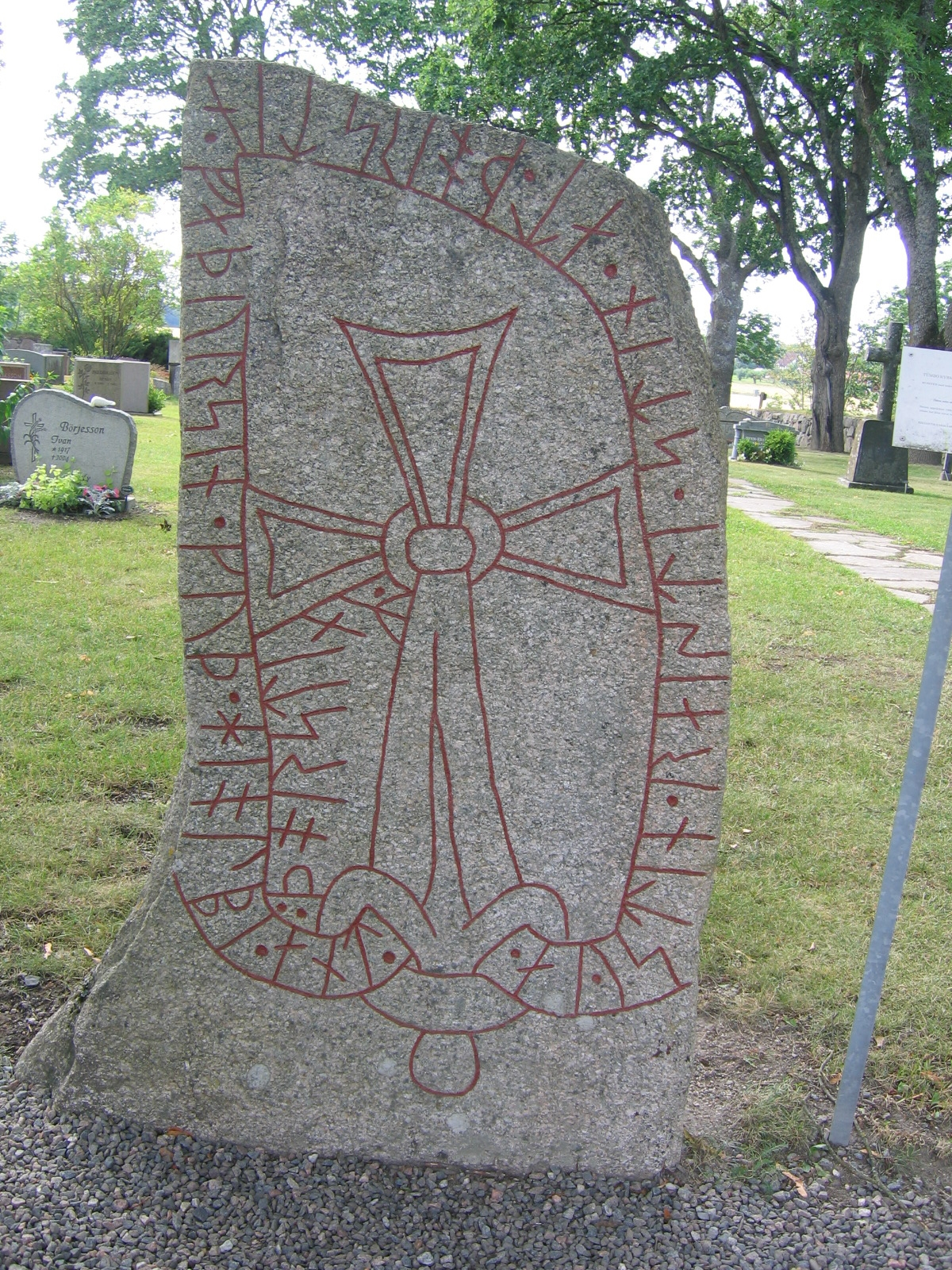 Runestone Sö 363